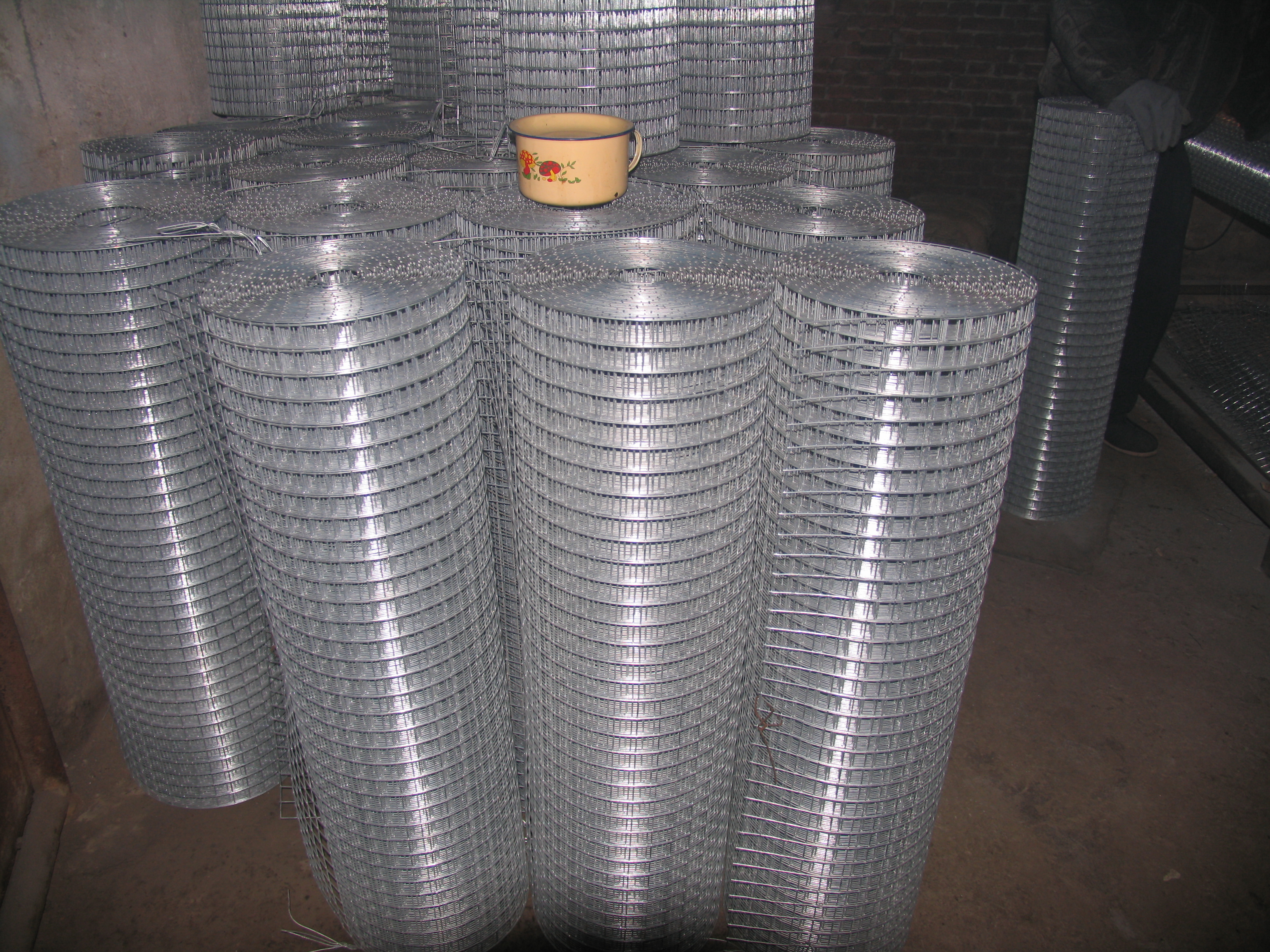 Рулон сварной сетки без упаковки